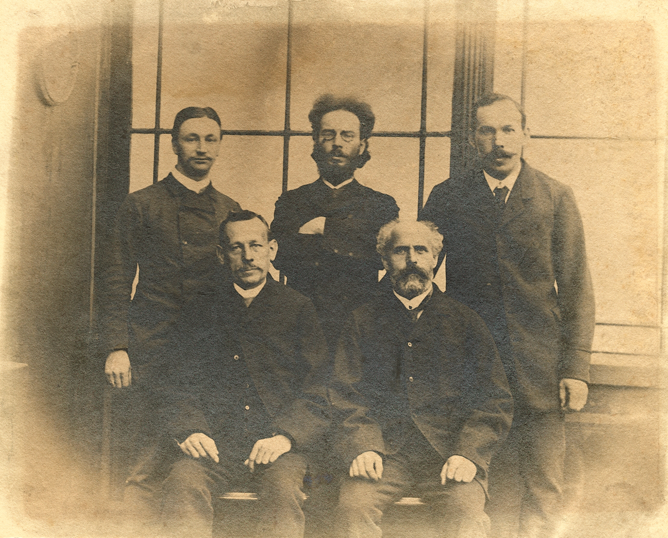 Alois Mailänder und Nikolaus Gabele (sitzend vorne, links nach rechts), zwischen beiden dahinter stehend Frederick Eckstein